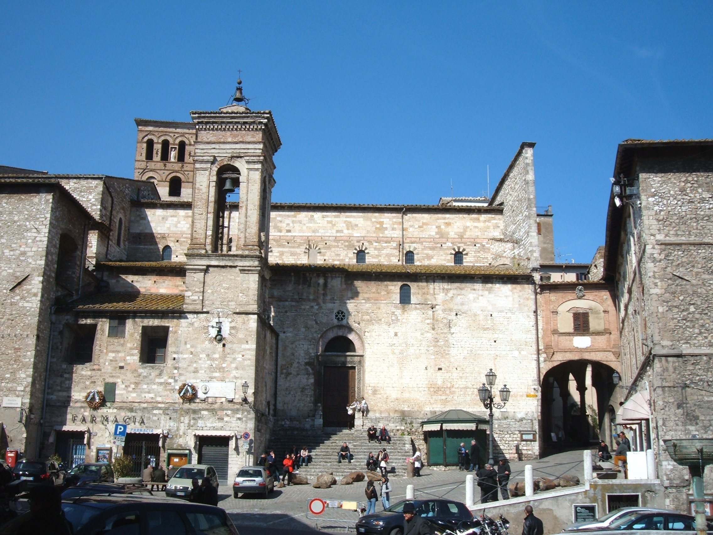 Chiesa di San Giovenale, a Narni. Esterno: fianco sinistro con campanile romanico e torre dell'orologio.